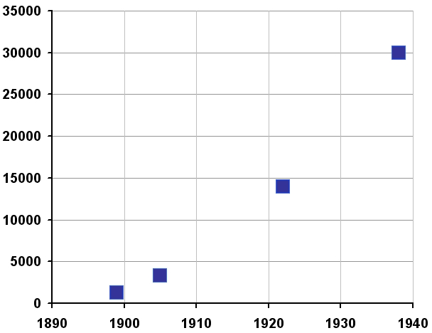 Statistik der Anzahl der erfassten Personen der "Zigeunerzentrale" München 1899-1938